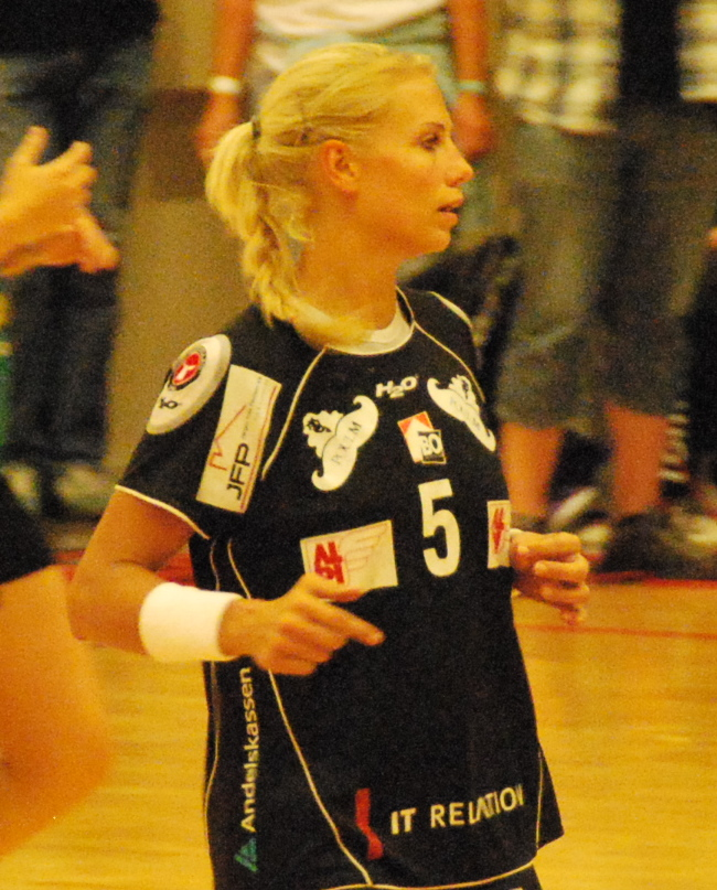 Håndboldspilleren Louise Svalastog Spellerberg fra FC Midtjylland Håndbold Her i en kamp mod Viborg HK i Viborg Stadionhal.